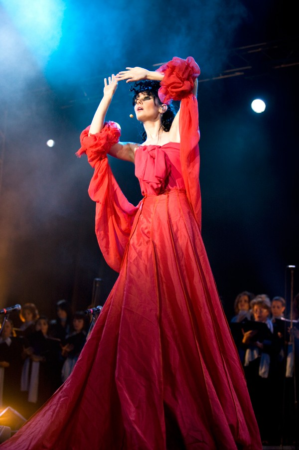 L'artiste lyrique néo-classique, auteur-compositeur-interprète et productrice française Emma Shapplin.